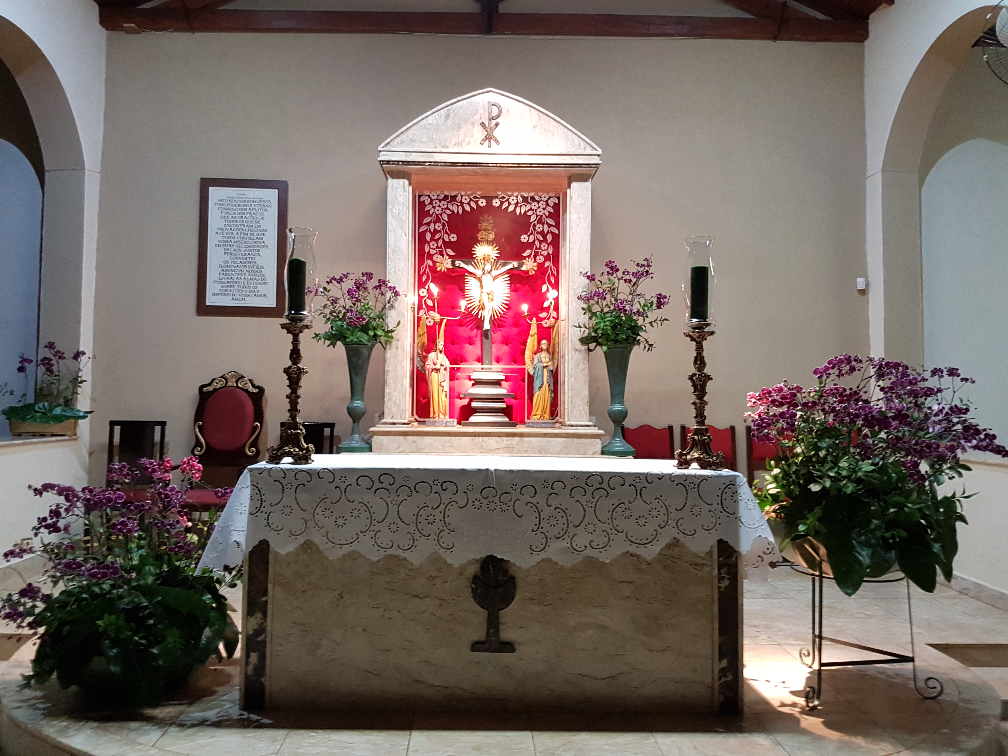 Jardinópolis-SP